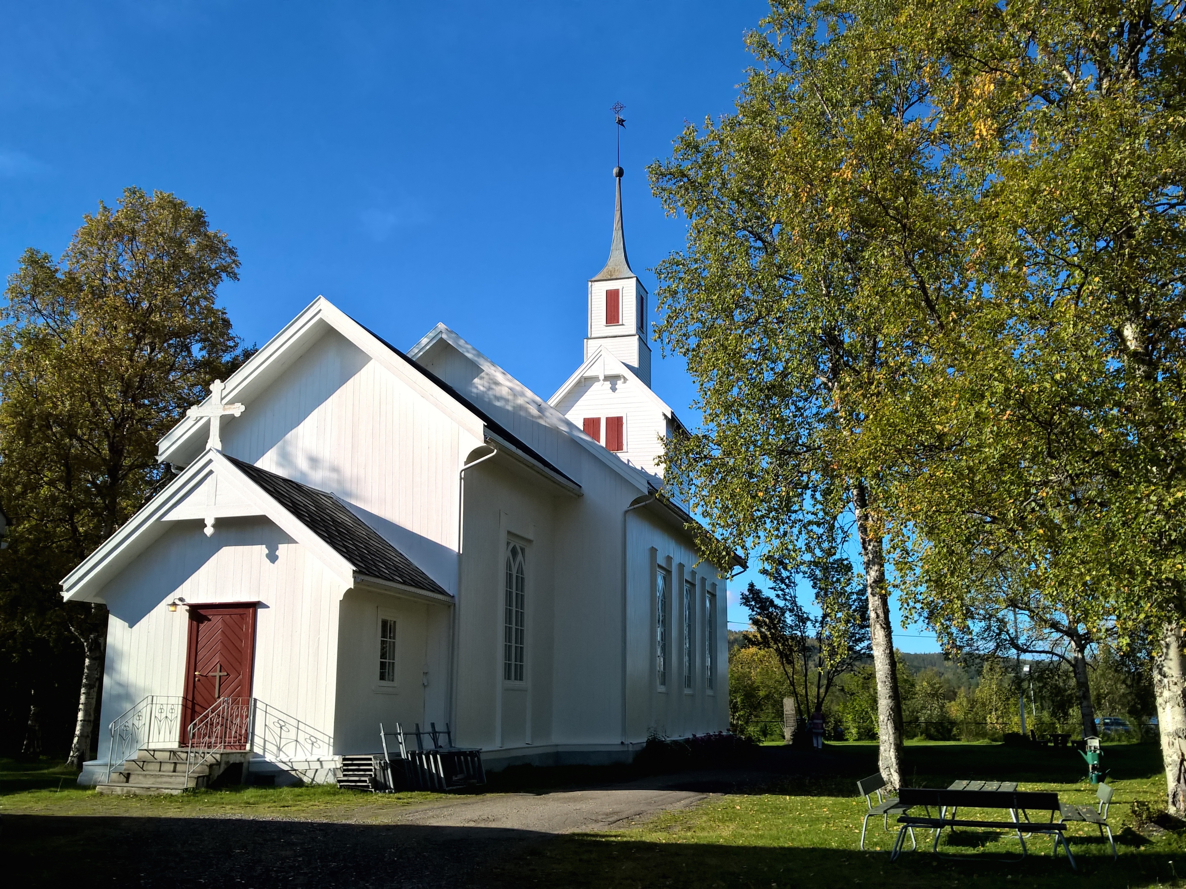 Øverbygd kyrkje i Målselv kommune, Troms. Fotografi teke 13. september 2015.